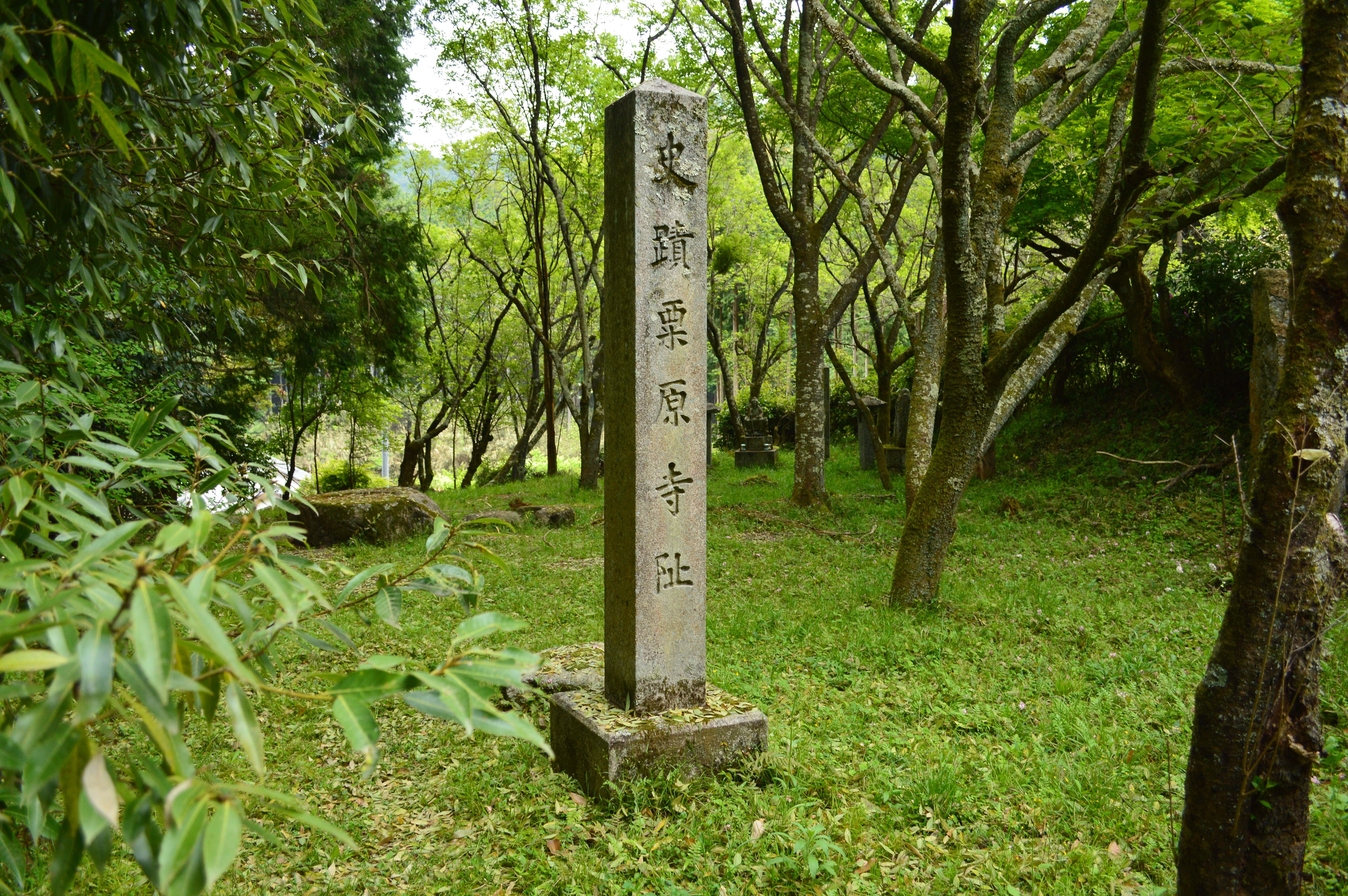 粟原寺跡 石碑